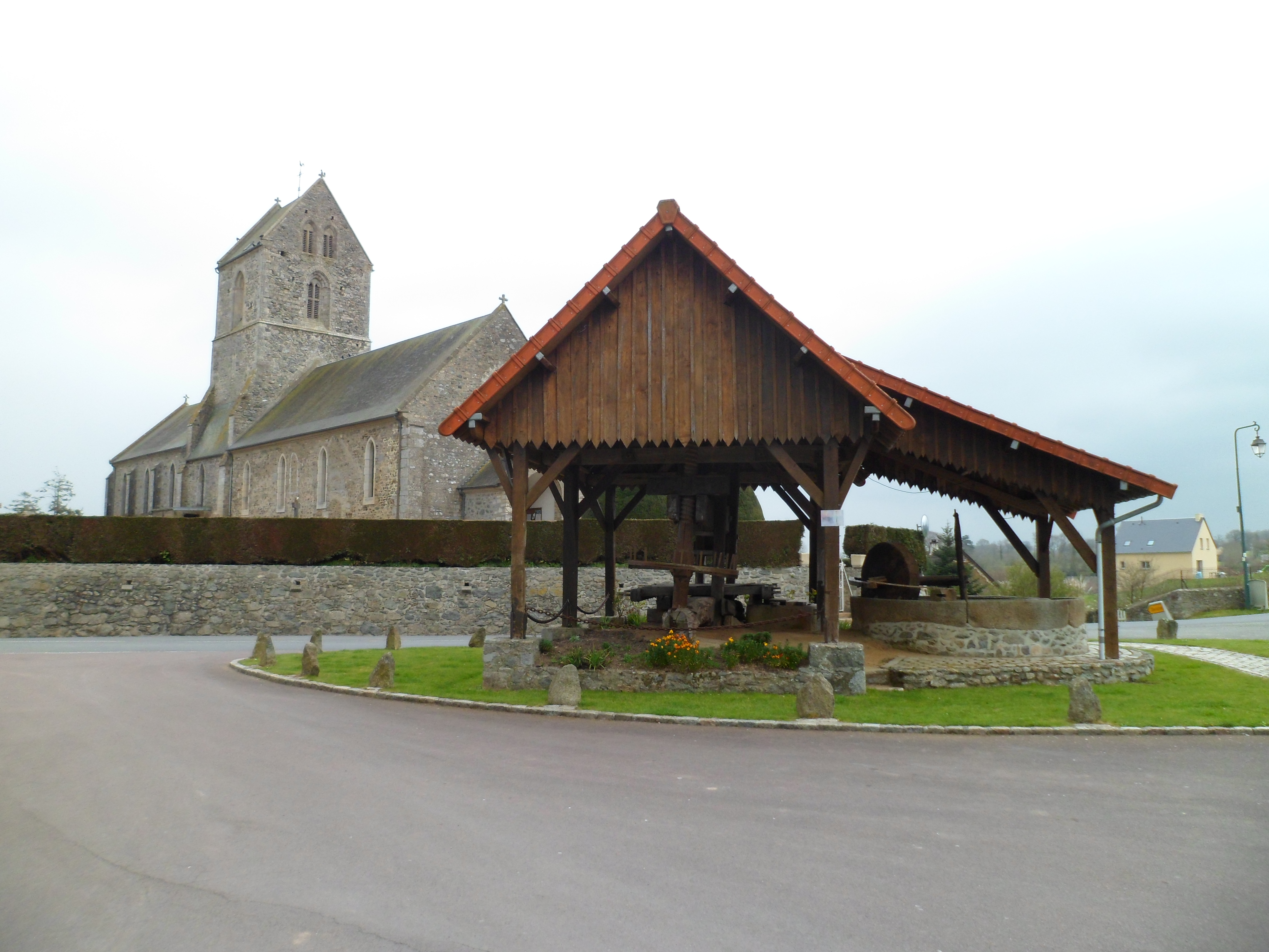 Feugères